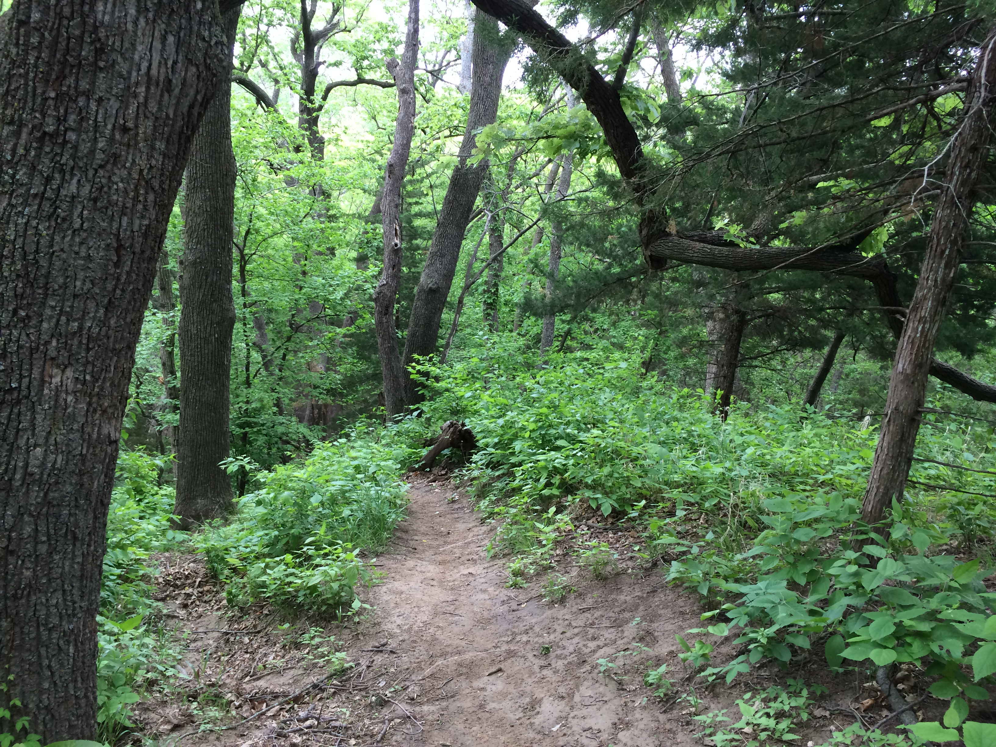 Hiking at Waubonsie State Park, IA